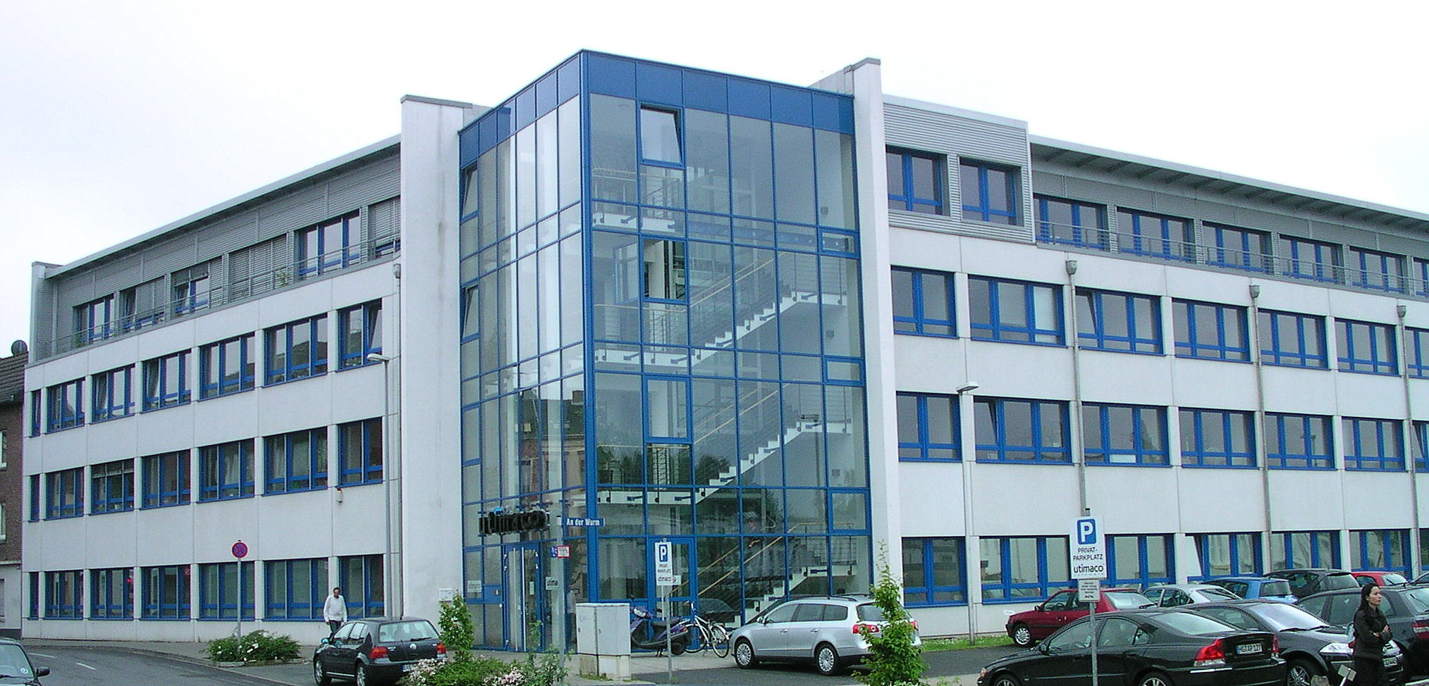 Aachen, Gebäude der Firma Utimaco in Aachen Haaren